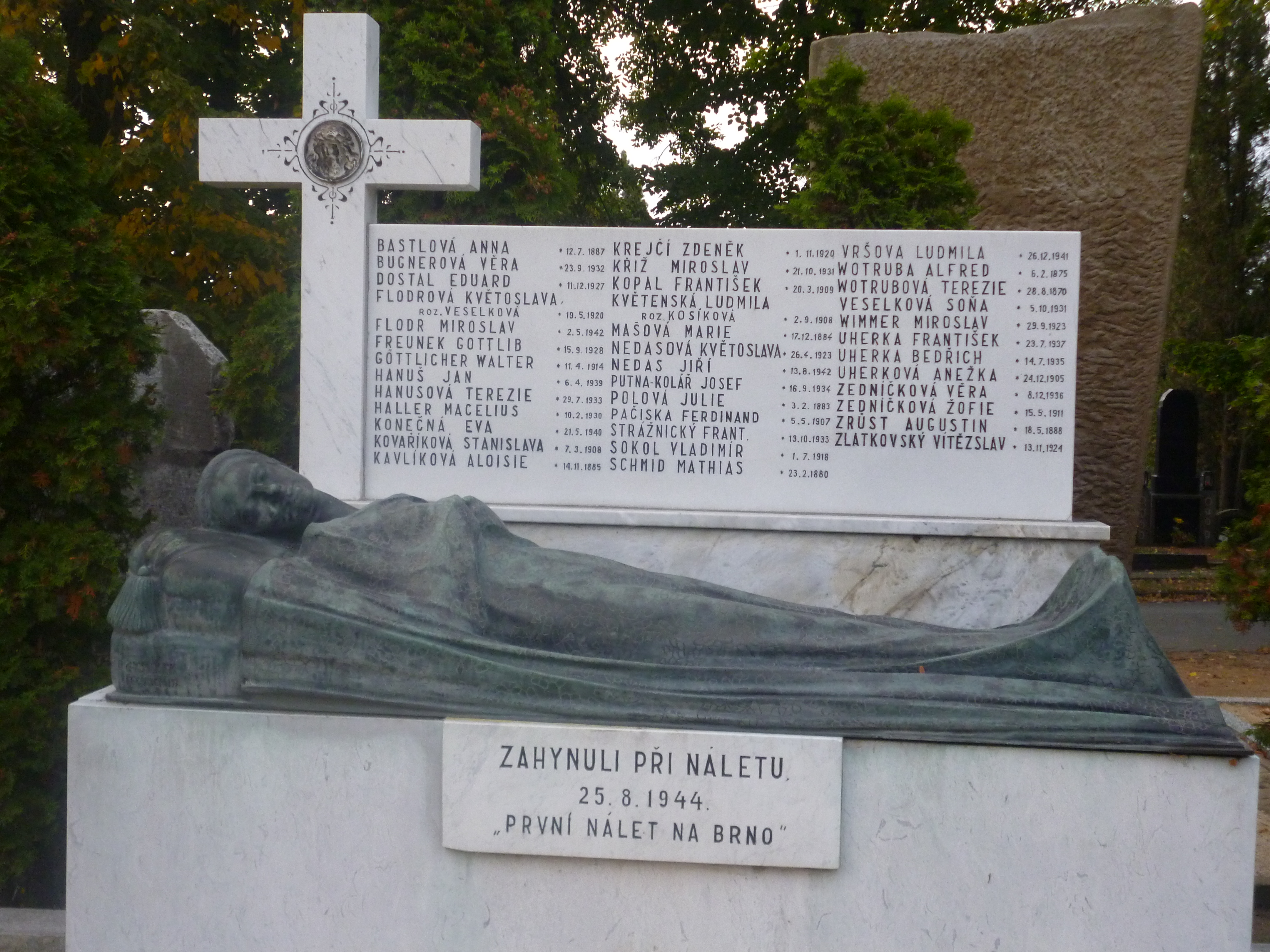 Brno-Židenice, hrob obětí náletu z 25. 8. 1944, vpravo od vchodu ve skupině čestných hrobů, autor plastiky C. Wollek